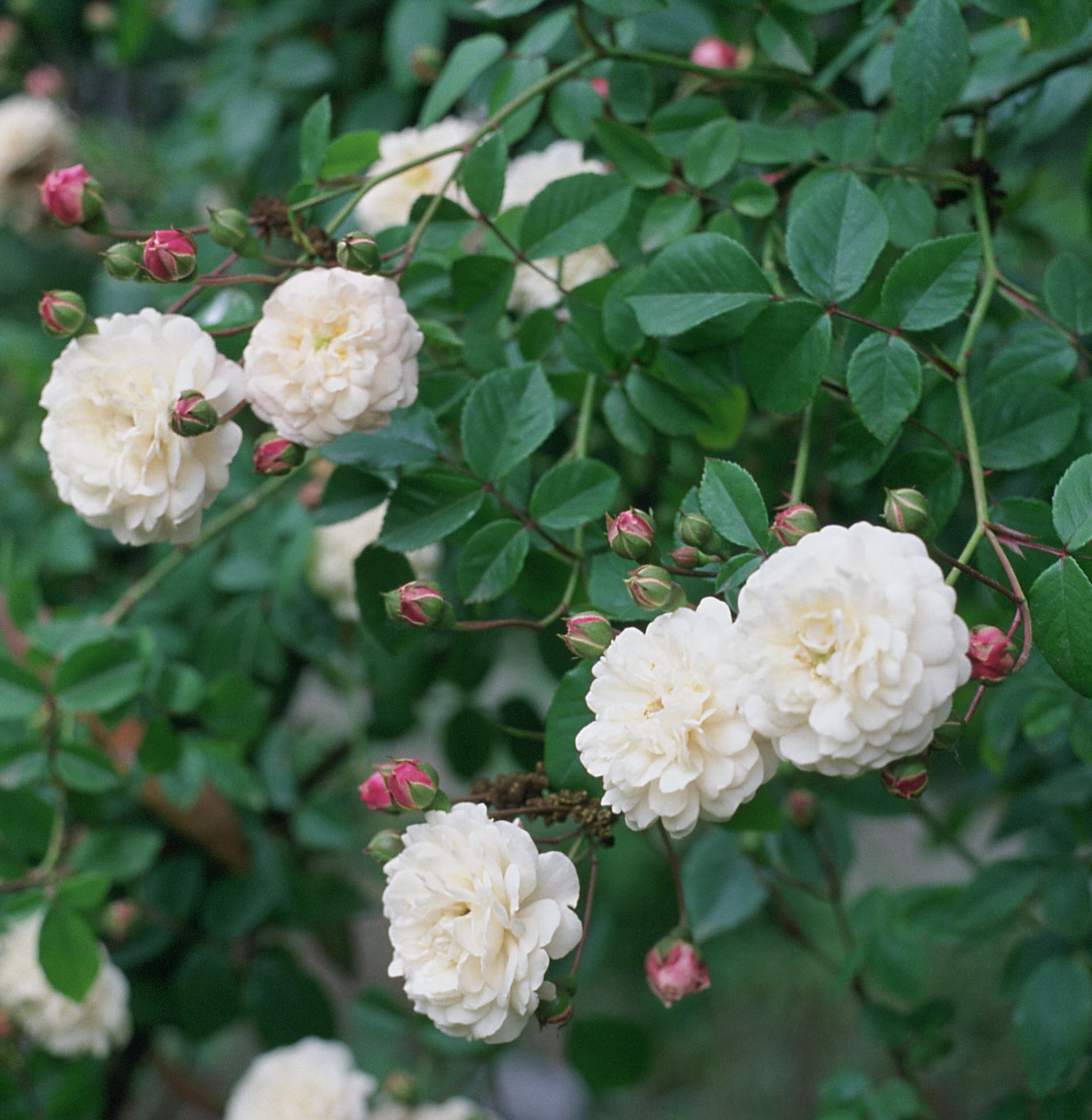 Rosa 'Félicité et Perpétue', gr. Sempervirens, sect. Synstylae. Real Jardín Botánico, Madrid